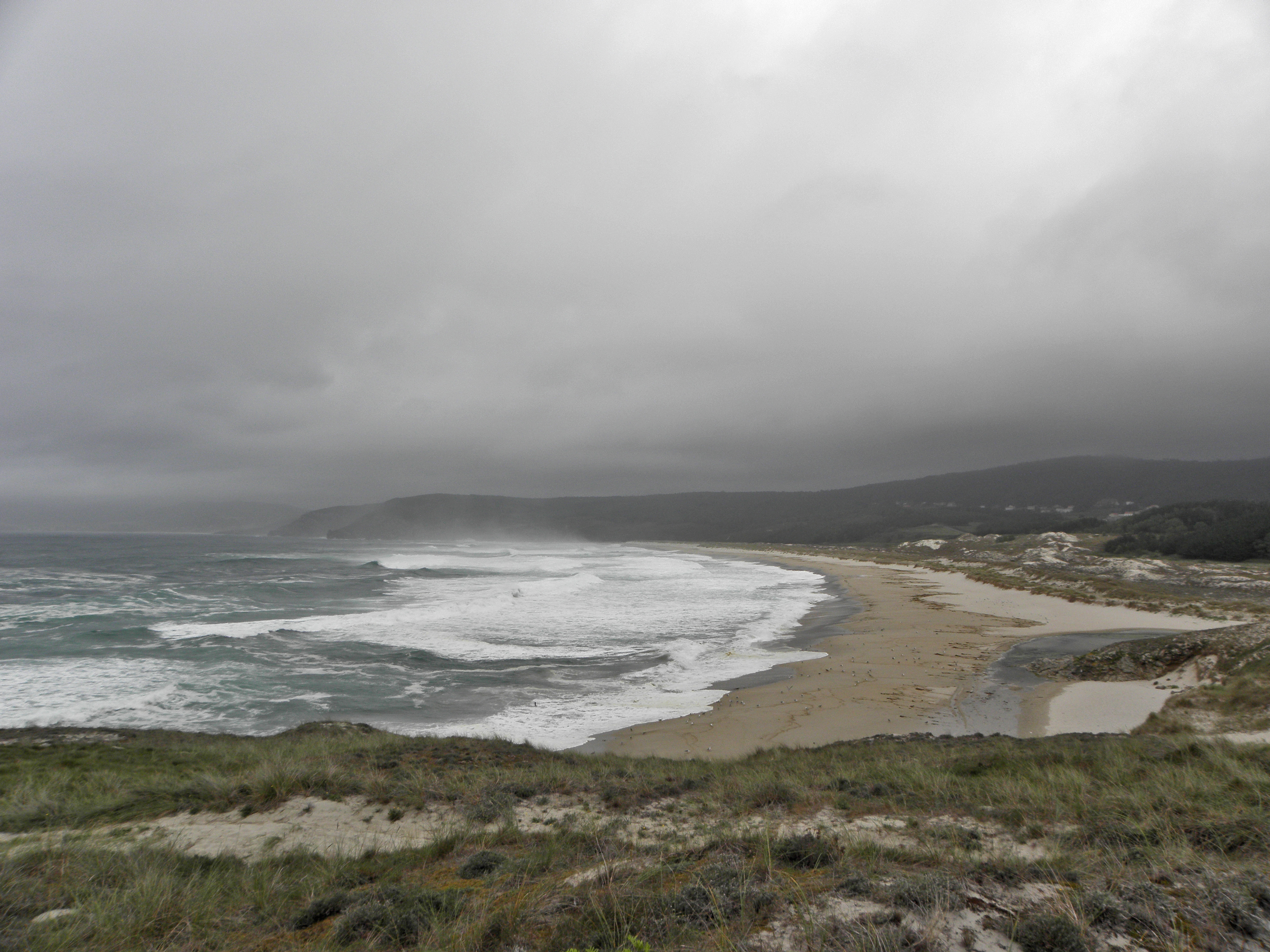 Existe unha lenda asociada a esta praia que afirma que debaixo das súas areas se atopa a mítica cidade de Dugium, fundada polos nerios e que sucumbiu baixo unha enorme onda nun apocalíptico temporal. O certo é que algo aconteceu aquí posto que o estudio|estudo xeolóxico demostra que, baixo a area, se sucederon cambios xeolóxicos con demasiada rapidez e se atoparon notables restos arqueolóxicos. Esta foto participó en otrolugardeflicrk